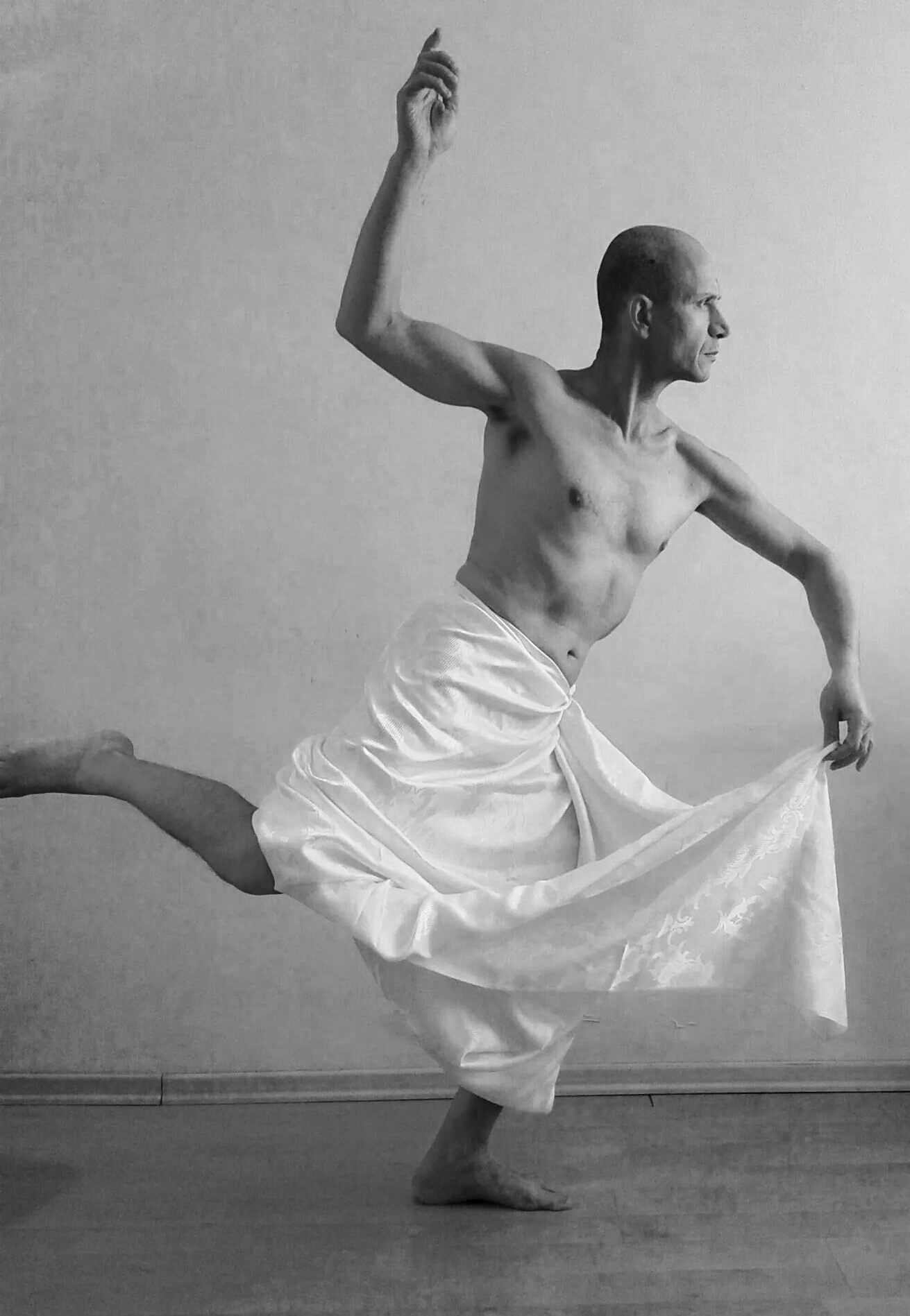 תענית הפרולטריון